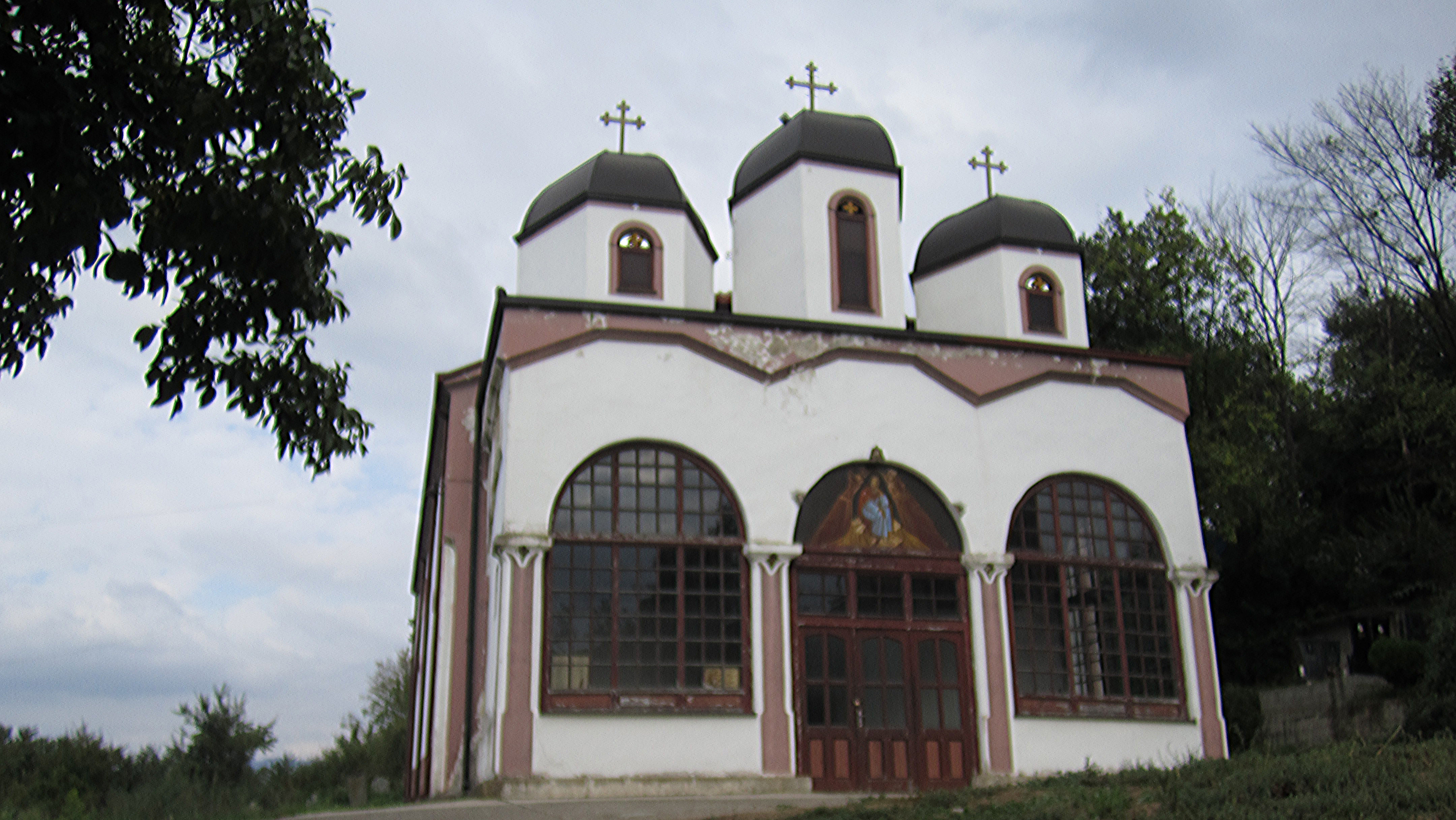 Srpski (latinica): Pečenjevce, Leskovac